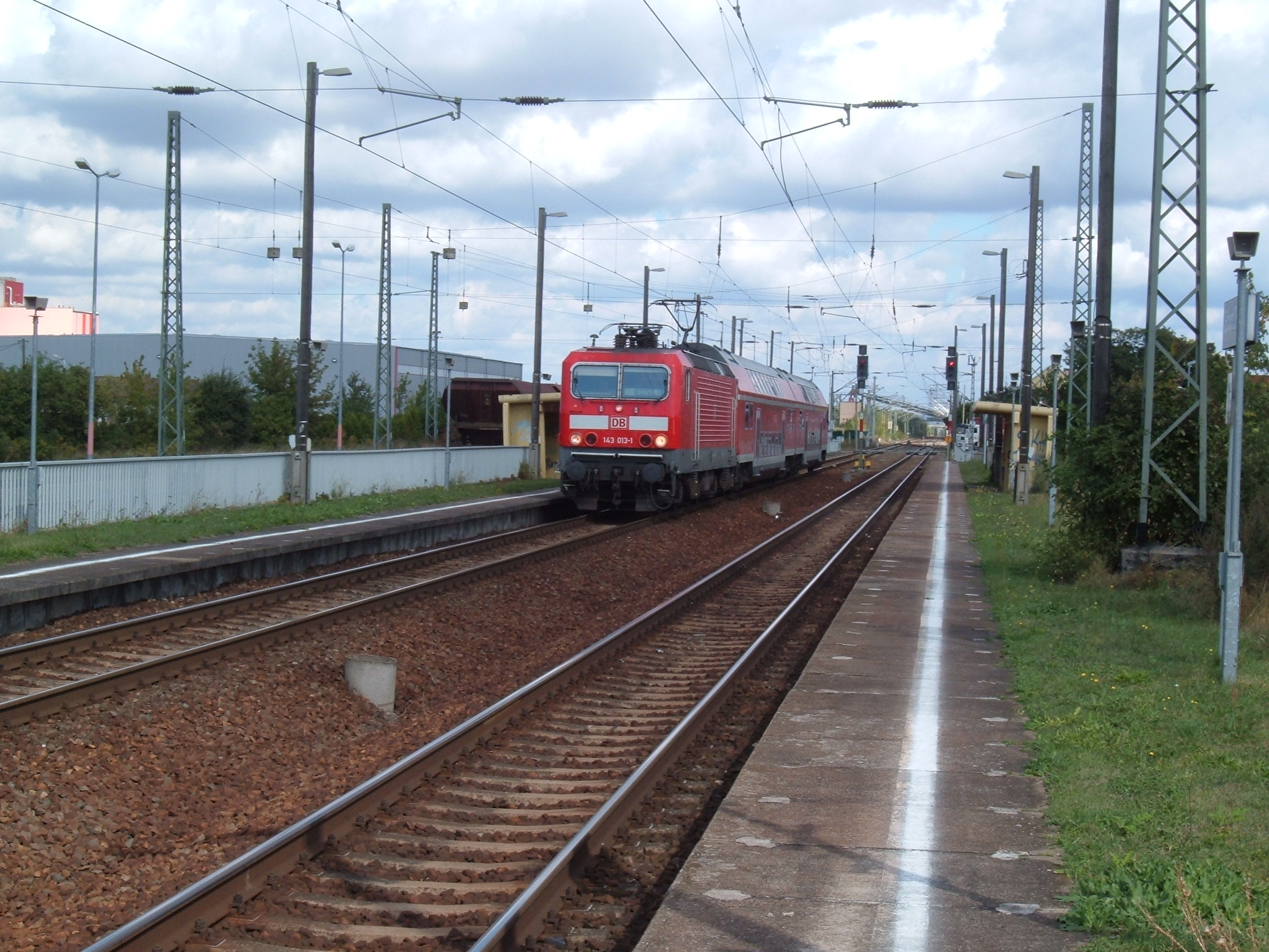 143 013 auf der "S-Bahn" zwischen Erfurt und Sömmerda. Bahnhof Erfurt Ost, September 2012.